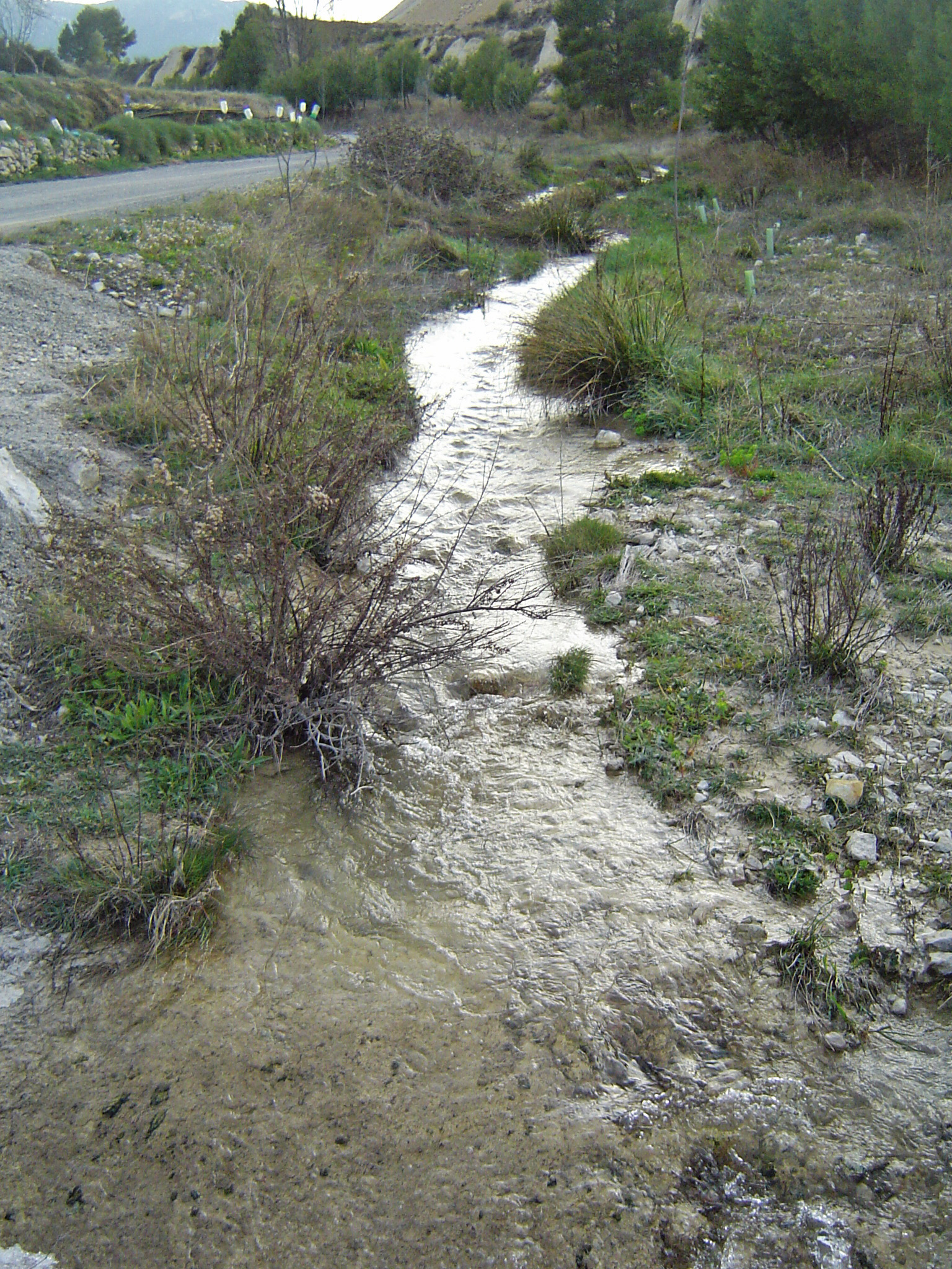 Río Quipar a su paso por "Bancal de Henares" en el término municipal de Cehegín